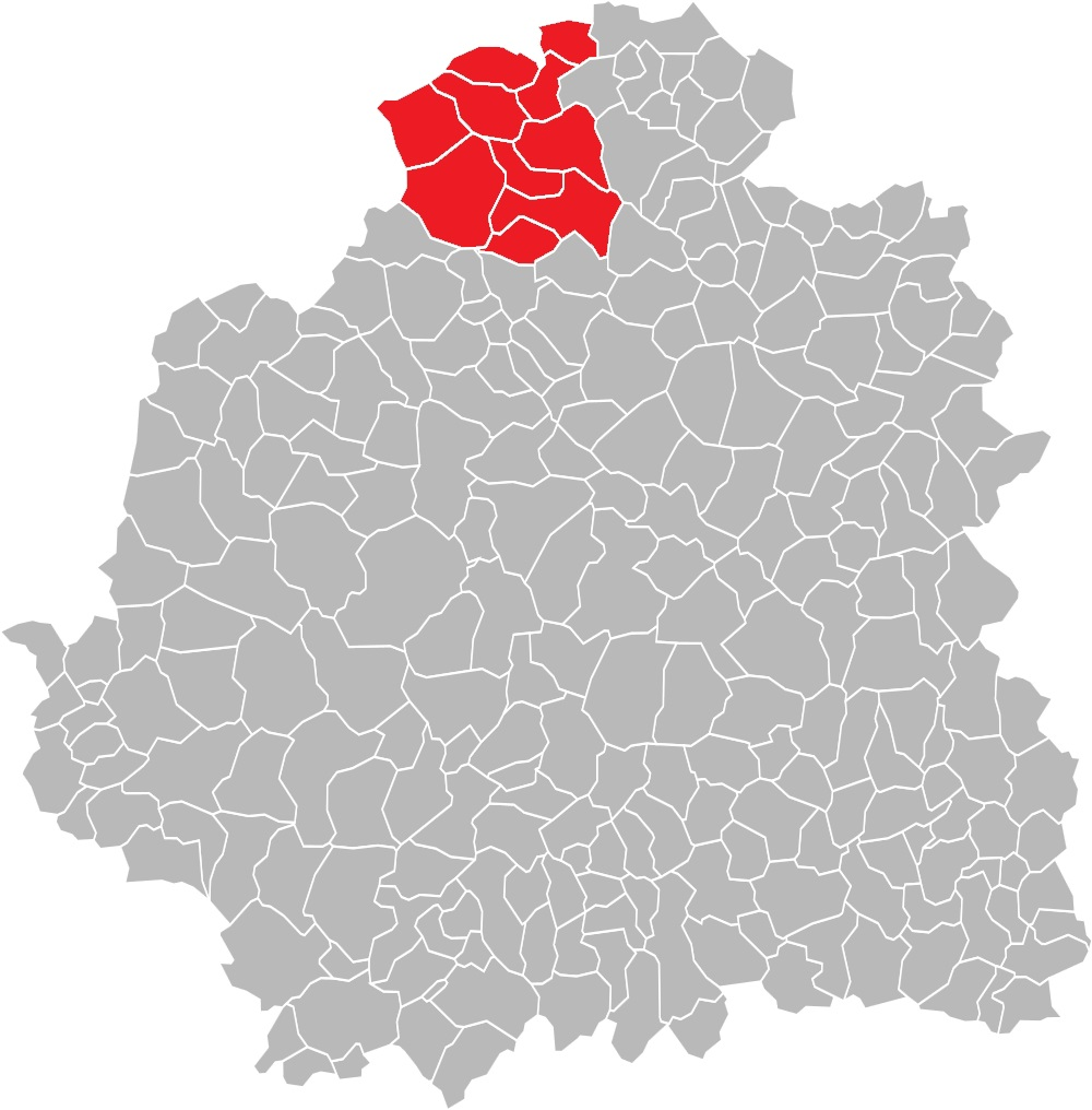 Carte des communes de l'Indre (36) : Le canton de Valençay, de 1790 à 2015.